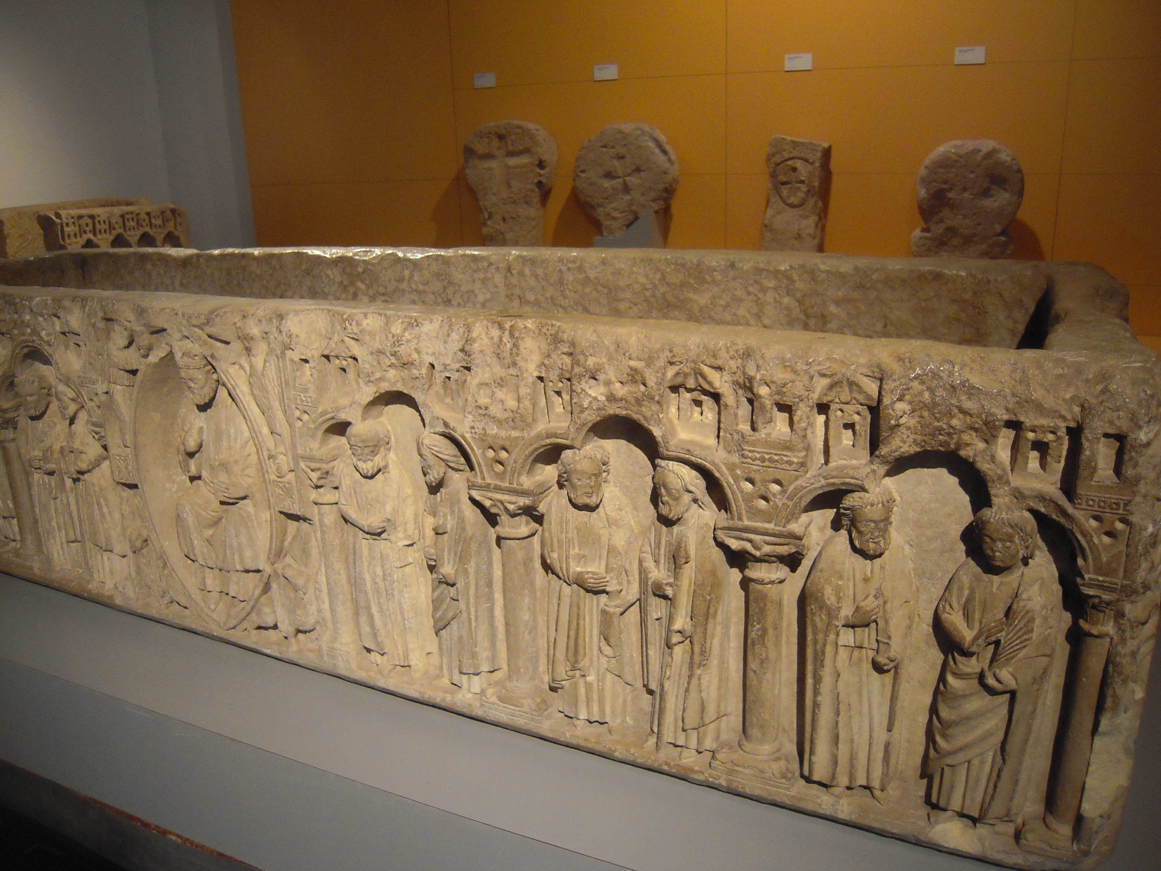 Sarcófago de estilo gótico de Santa María de Benevívere (Taller de Carrión de los Condes), datado entre 1240-1260, expuesto en el Museo Arqueológico de Palencia (Castilla y León).